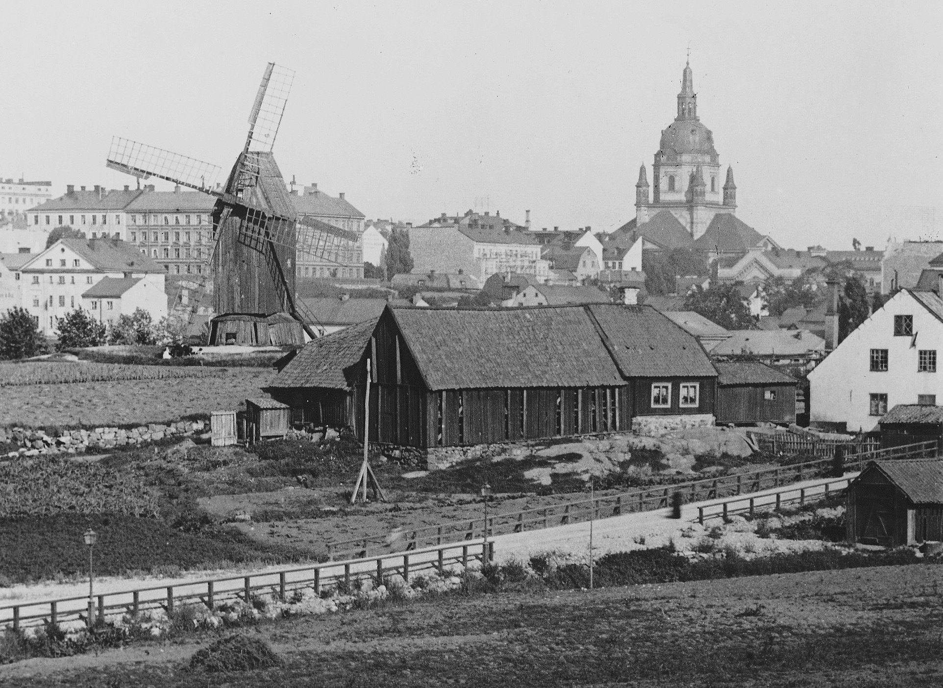 Kvarenen Fatburan t.v. och Katarina kyrka i bakgrunden. I förgrunden den blivande Åsögatan.